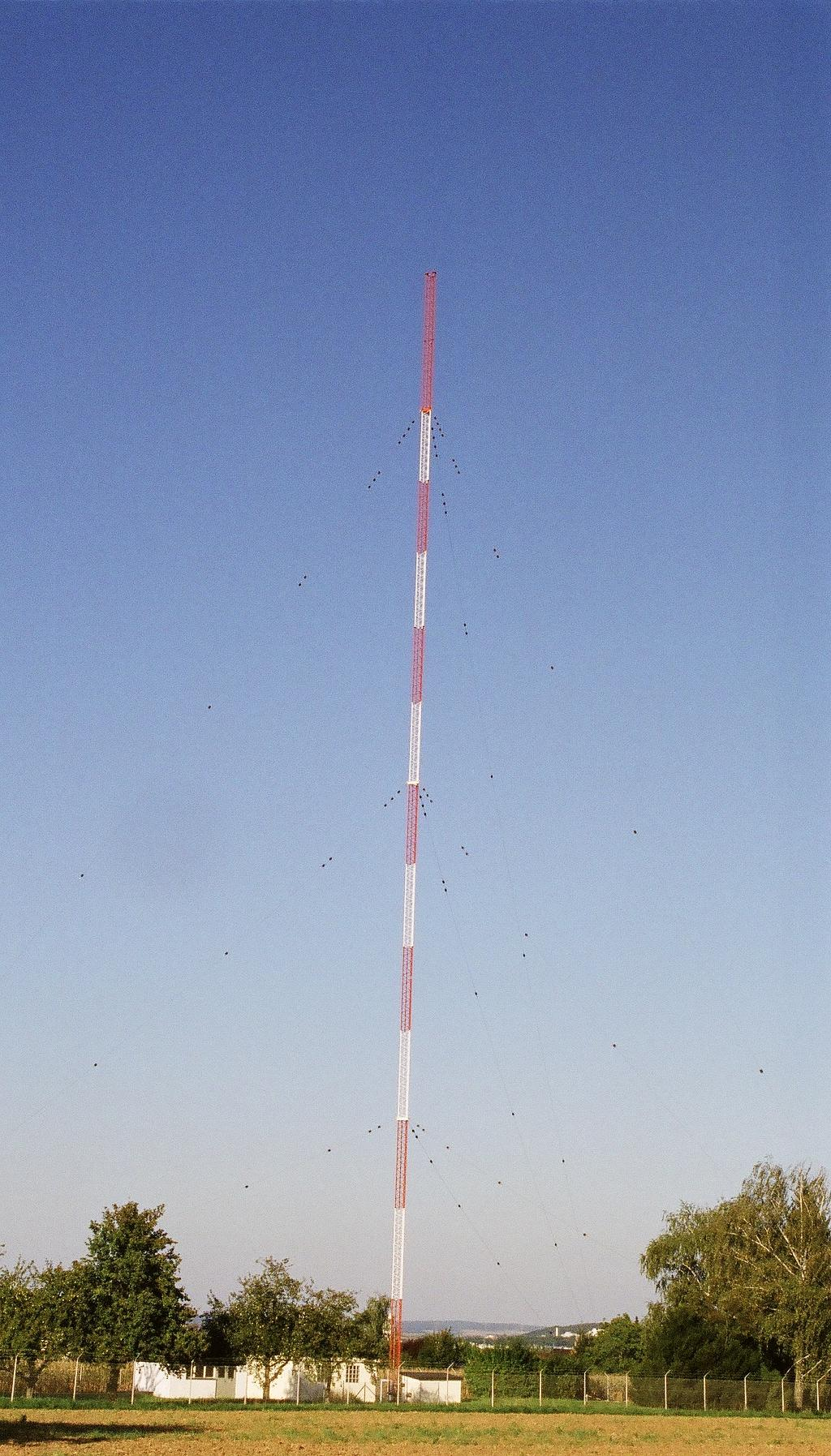 Sendemast Obereisesheim